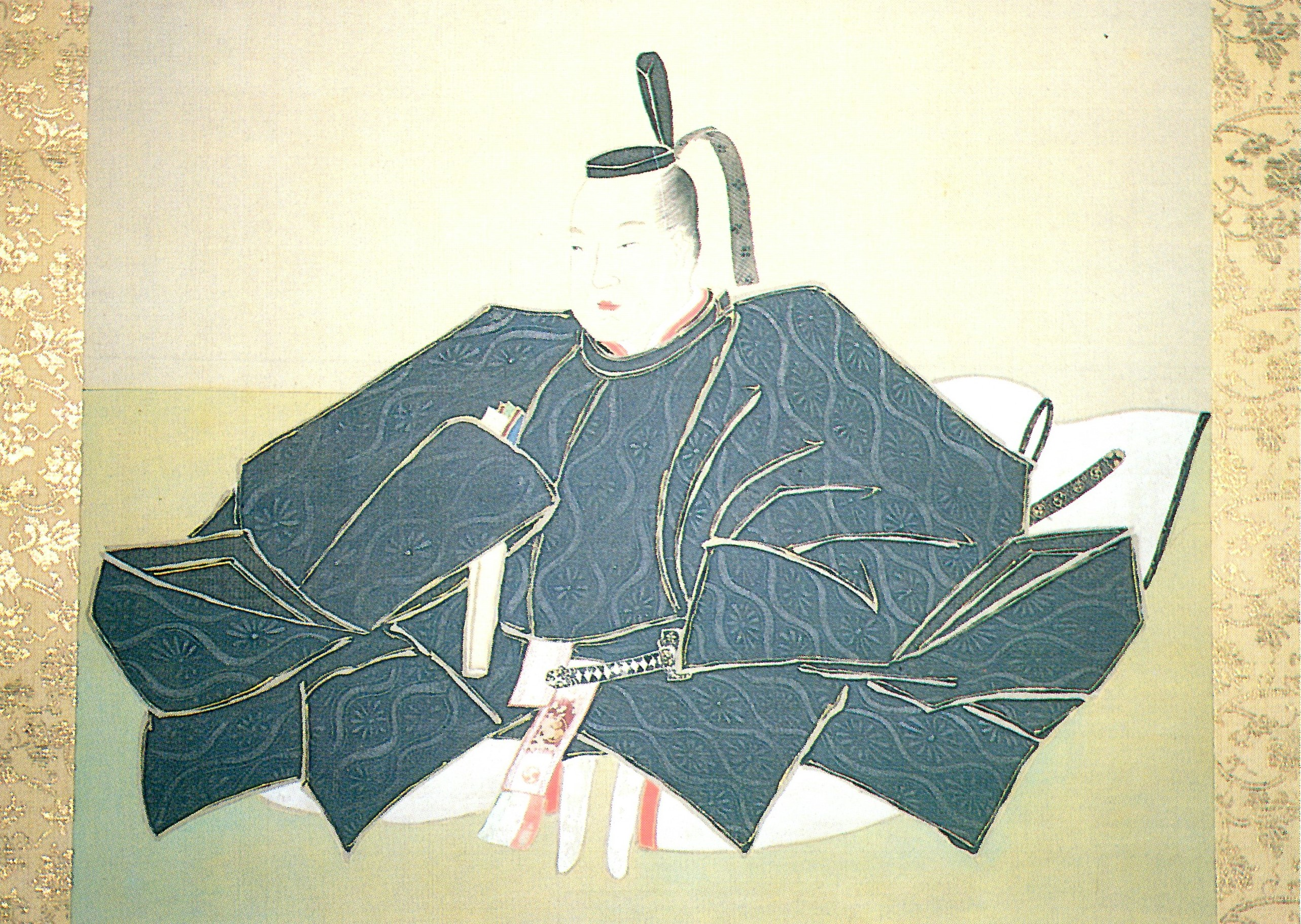 松平基知の肖像。